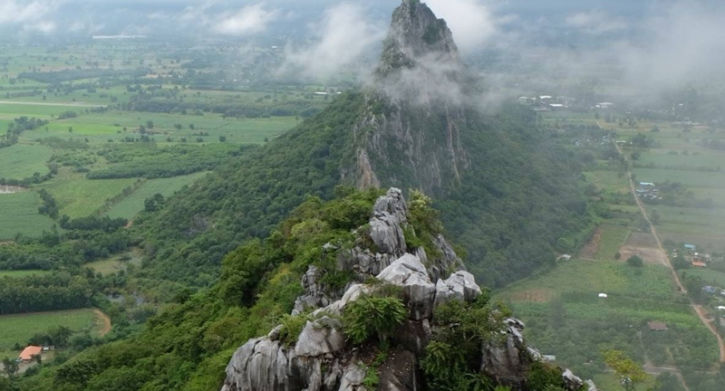 cr.Wongnai